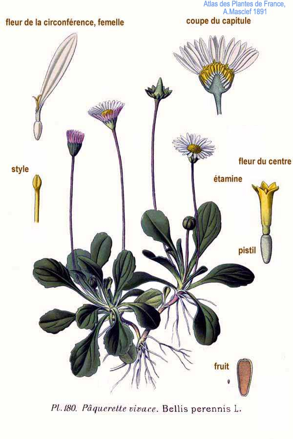 Bellis perennis L.